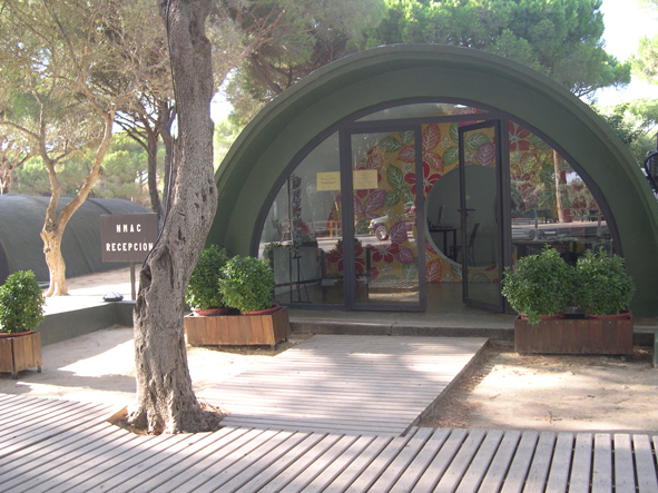 Recepción de la Fundación NMAC